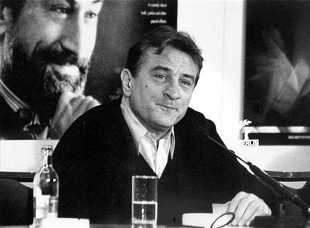 Robert De Niro auf einer Pressekonferenz auf den Internationalen Filmfestspielen Berlin 1998 anlässlich der Vorführung von Wag the Dog – Wenn der Schwanz mit dem Hund wedelt (Regie: Barry Levinson, mit Dustin Hoffman, Anne Heche, Denis Leary u.a.); der Film erhielt den Silbernen Berliner Bär (Spezialpreis der Jury). Kamera: Minolta 9000 mit 1:4,0/70-210mm